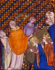 Ludvík IX. a Markéta Provensálská svatba